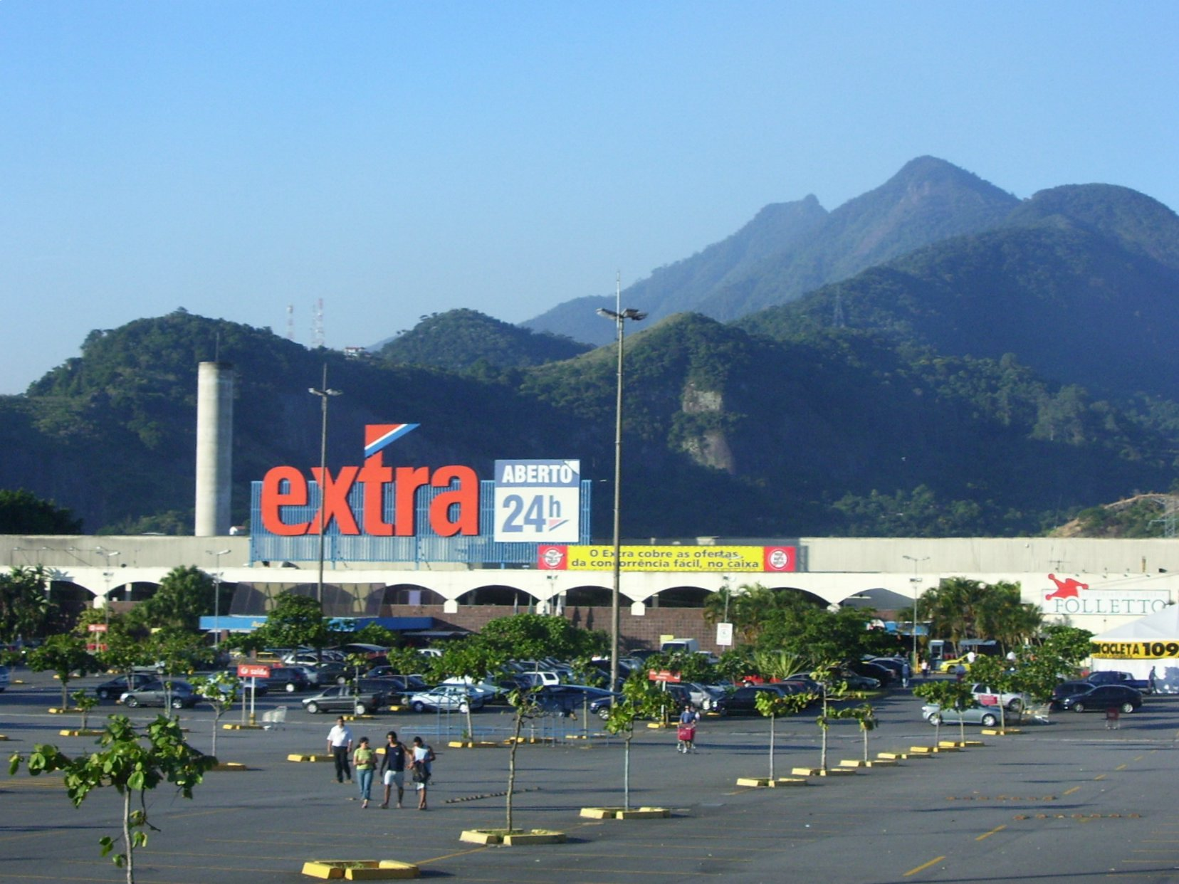 Loja do Extra na Barra da Tijuca, Rio de Janeiro, RJ, Brasil.